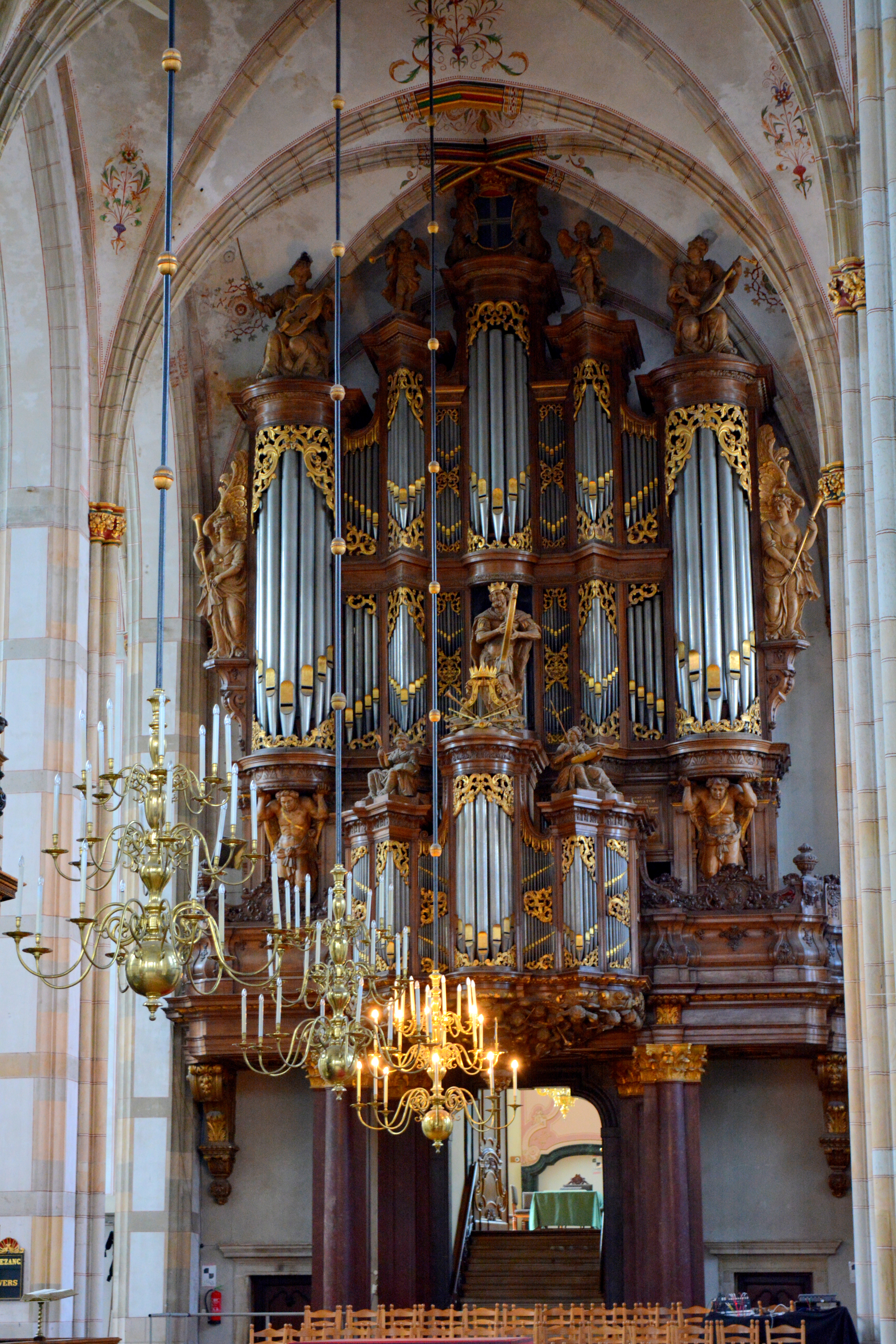 Grote Kerk, Zwolle, Schnitgerorgel